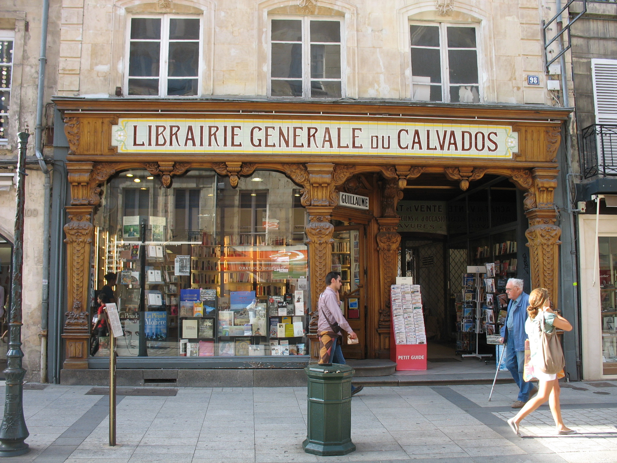 Maison Chibourg à Calvados (Basse-Normandie, France).